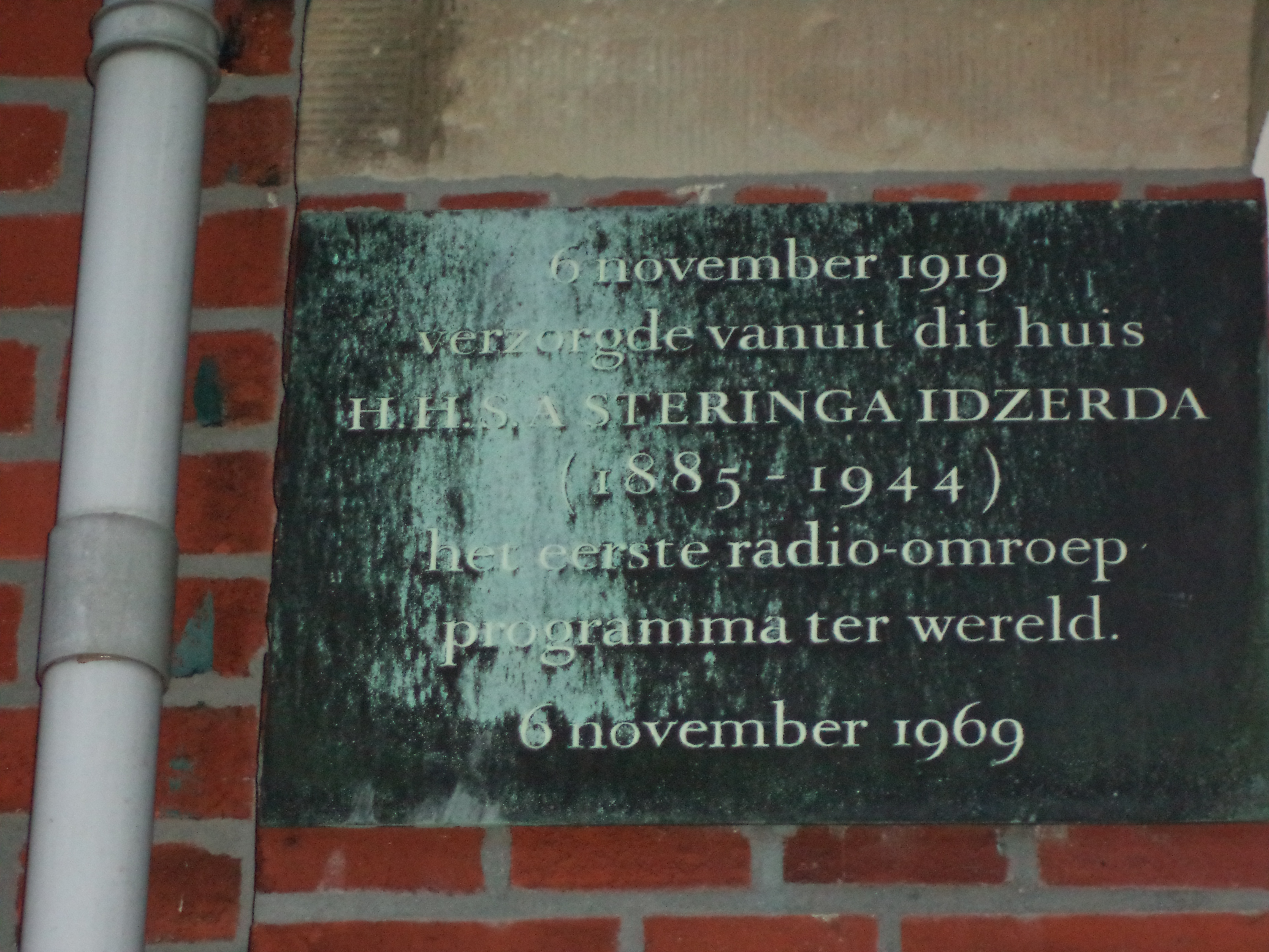 Plaquette aan gebouw Beukstraat 8, Den Haag, als gedenkteken dat H.H.S. A Steringa Idzerda vanuit dit huis het eerste radio-omroepprogramma ter wereld verzorgde.